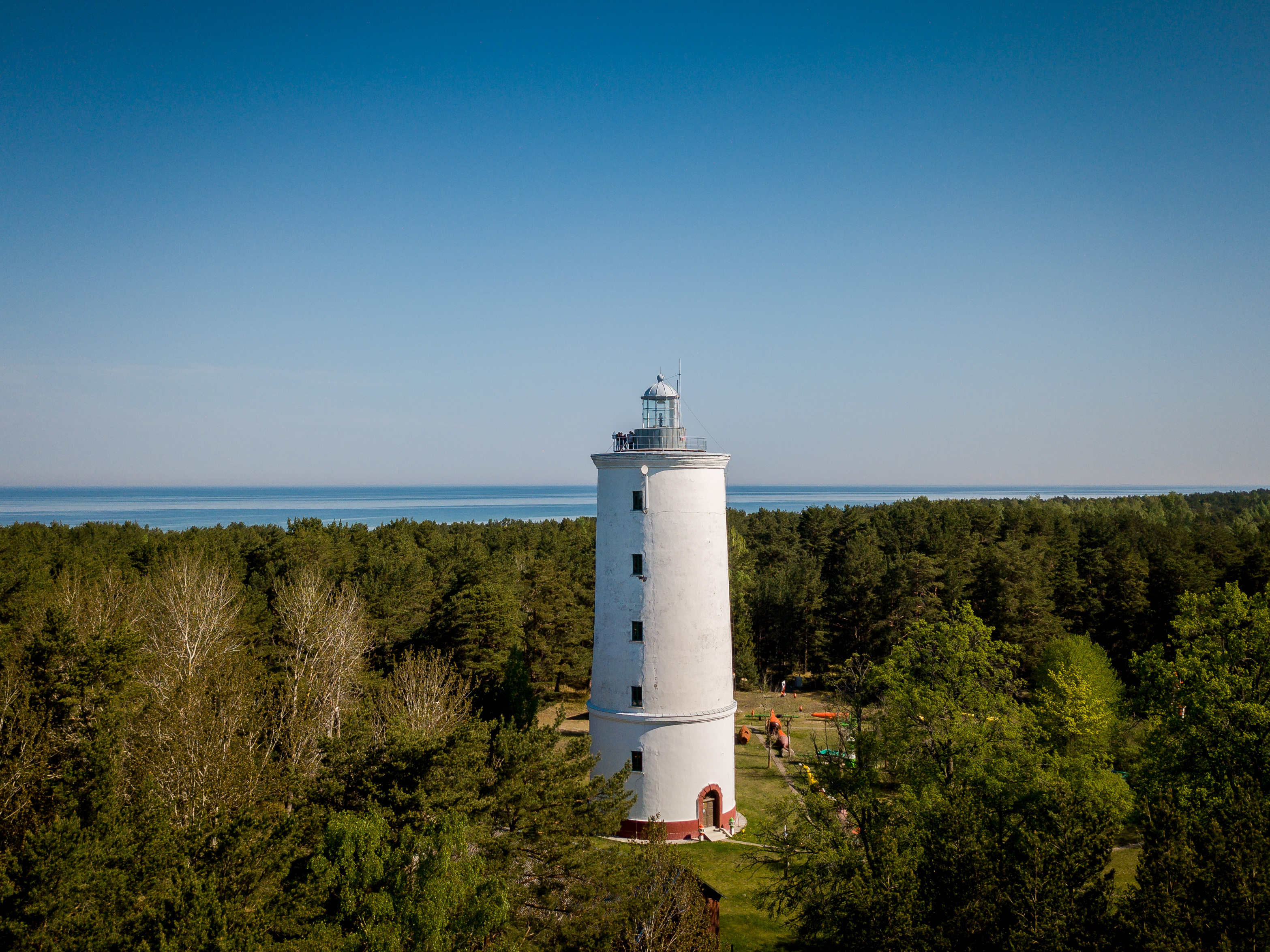 Ovišu bāka, Tārgales pagasts